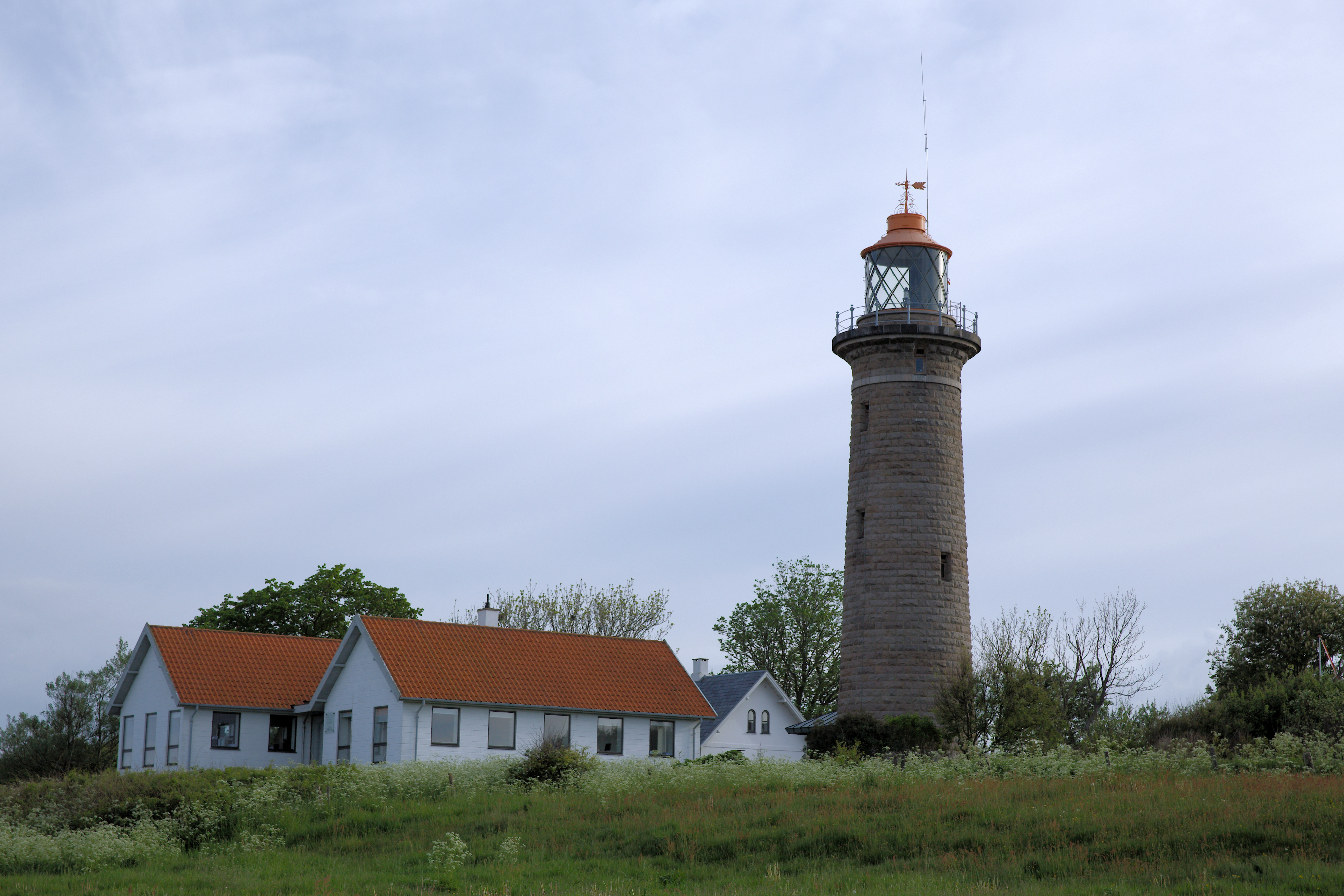 Fornæs Fyr